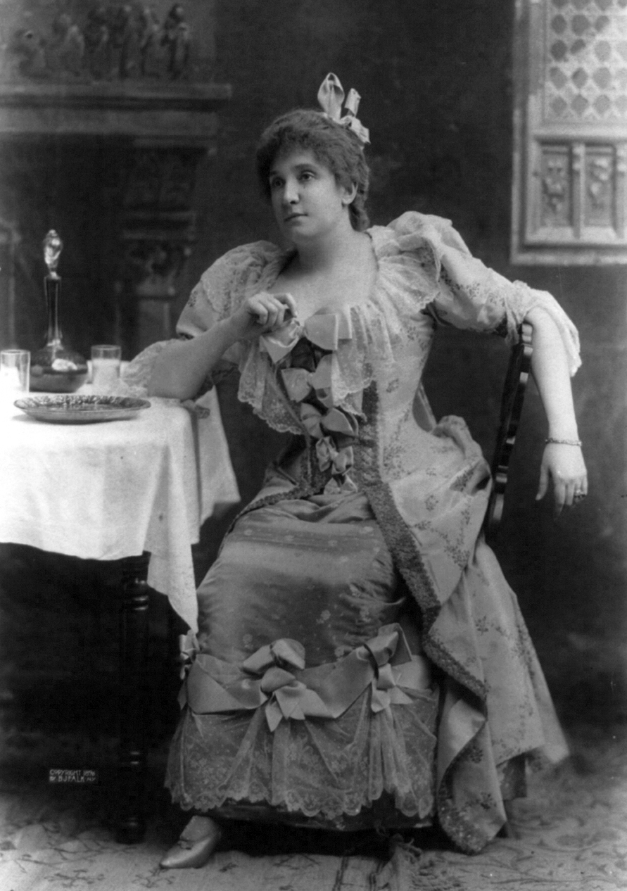 Australian opera singer Nellie Melba (1861-1931)